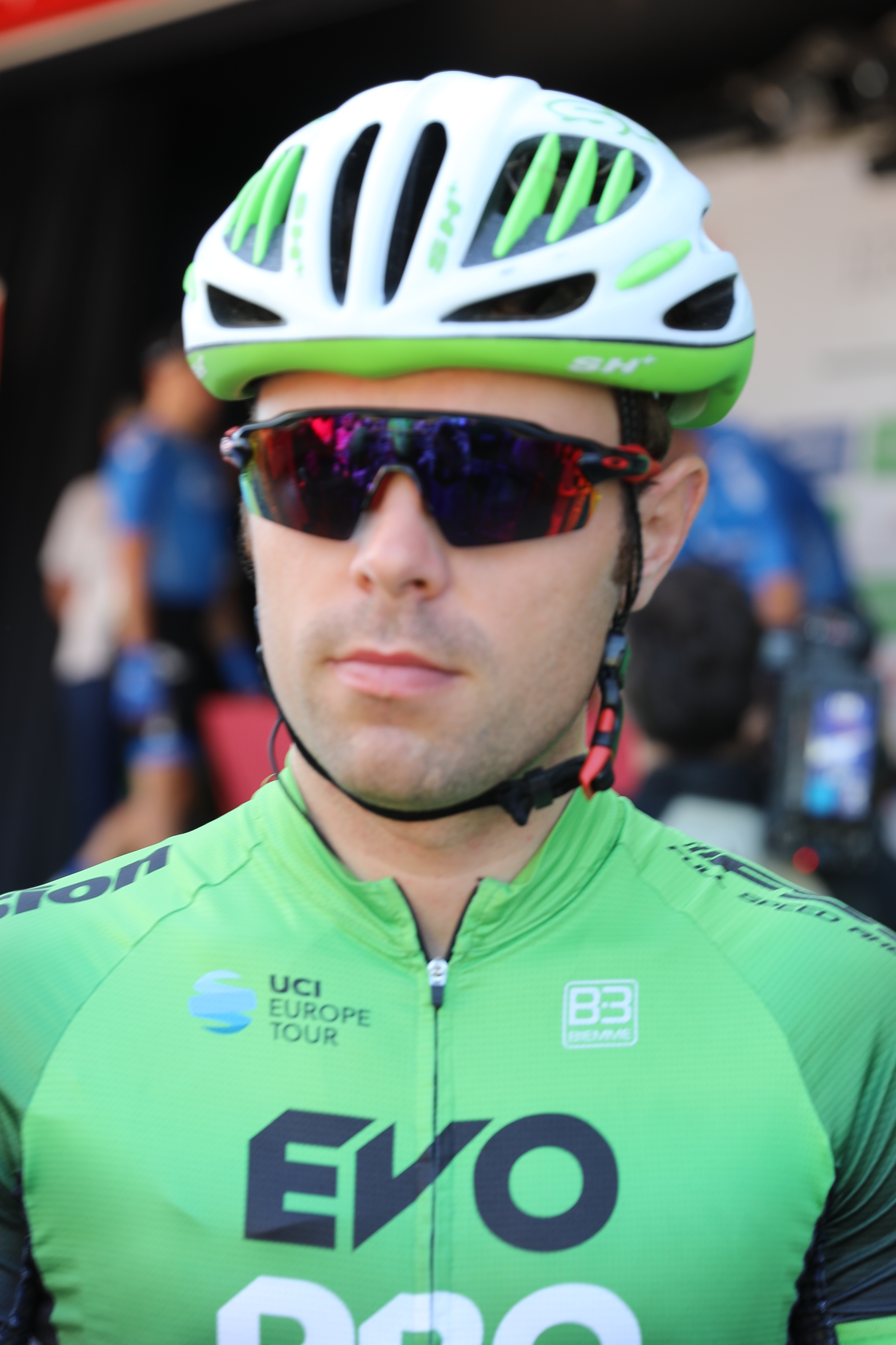 Wouter Wippert, niederländischer Radrennfahrer